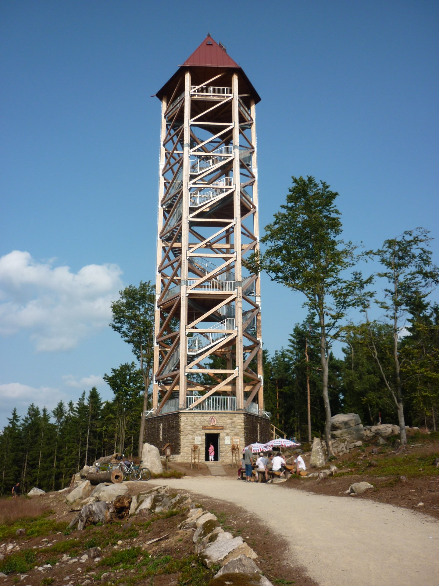 Rozhledna U Jakuba ve Valtínově - otevřeno v roce 2013